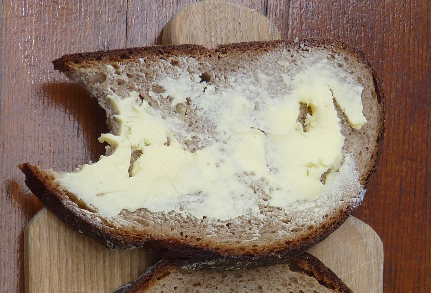 Butterbrot